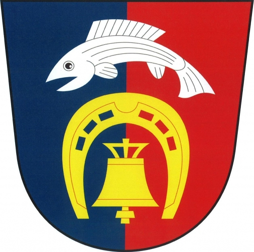 znak, Cekov, okres Rokycany